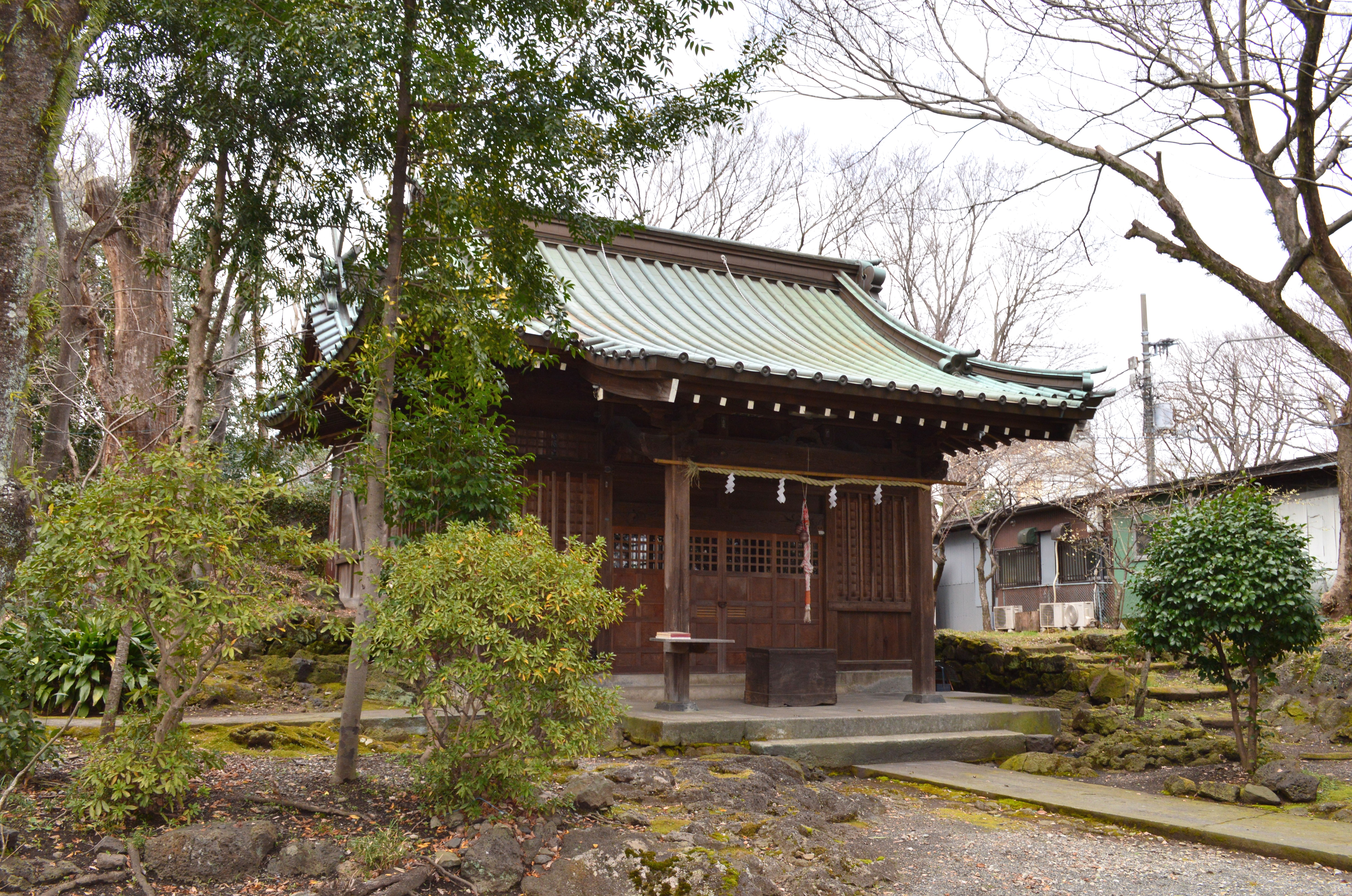 浅間神社 (三嶋大社元境外摂社)